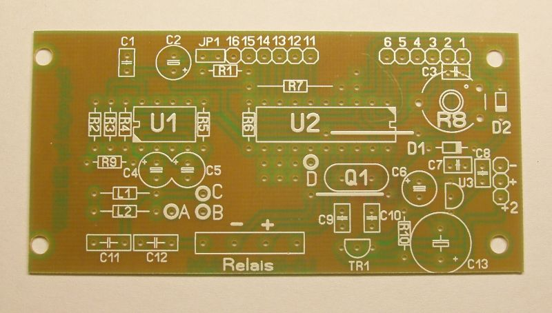 Eine Leiterplatte (Basismaterial FR2) mit Bestückungsdruck